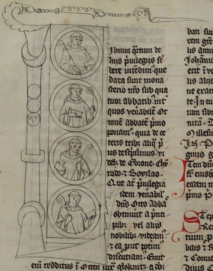 Äbte von Zwettl - Bohuslaus, Ebro, Konrad, Otto I. - Historisierte Initiale auf f. 73v der Bärenhaut